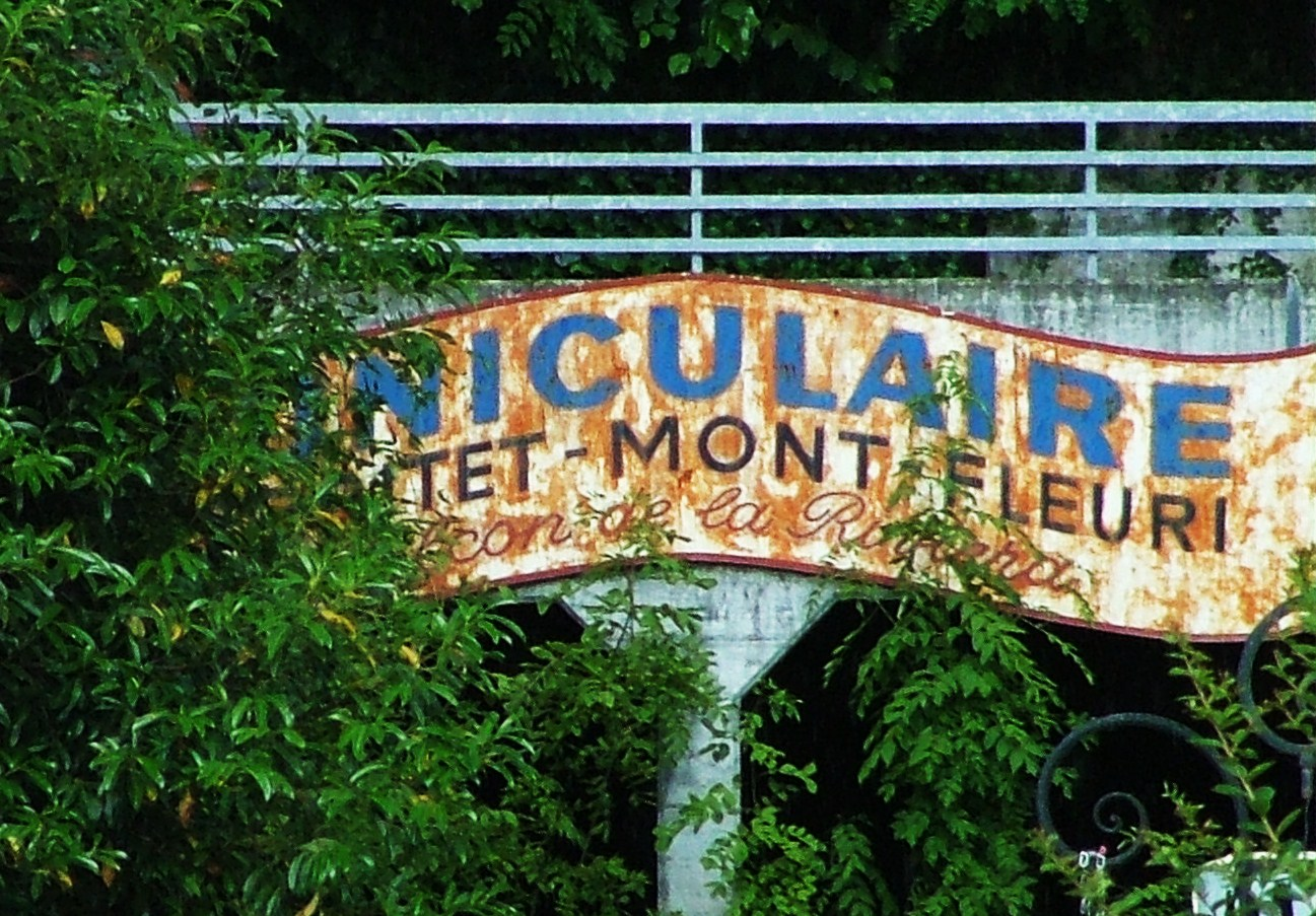 Kolej Territet – Mont-Fleuri w 2006 roku.